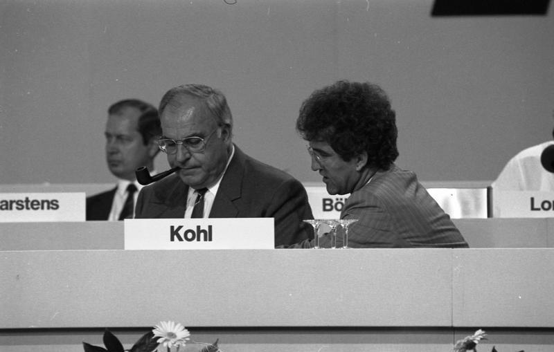 7./8.10.1986 34. Bundesparteitag der CDU in der Rheingoldhalle, Mainz (6.-8.10.1986)